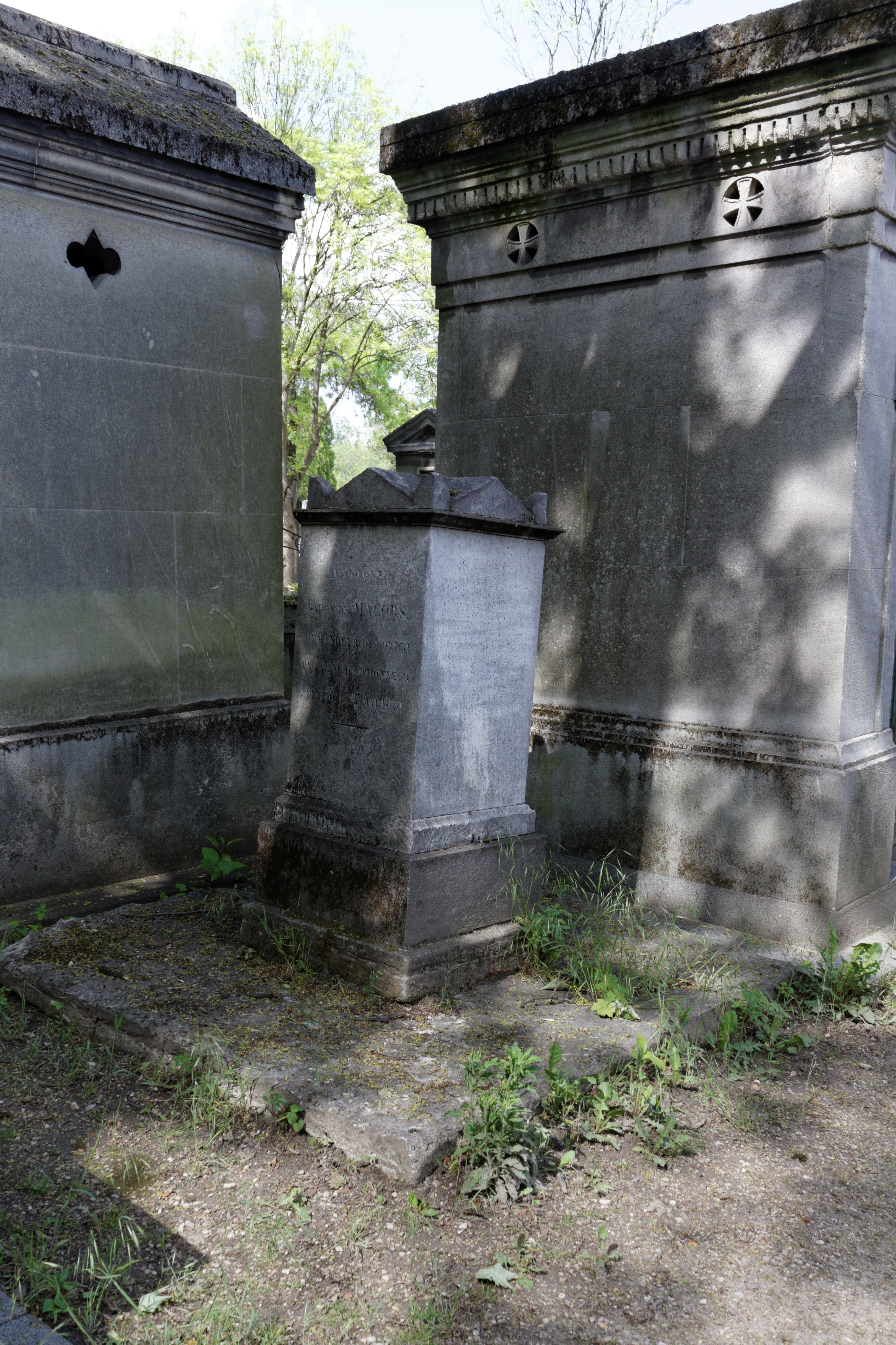 Sépulture du général François Antoine Joseph Nicolas Macors (1744-1825), son épouse Louise Chaumat, décédée en 1803 et son fils le colonel baron de Macors, décédé en 1851.